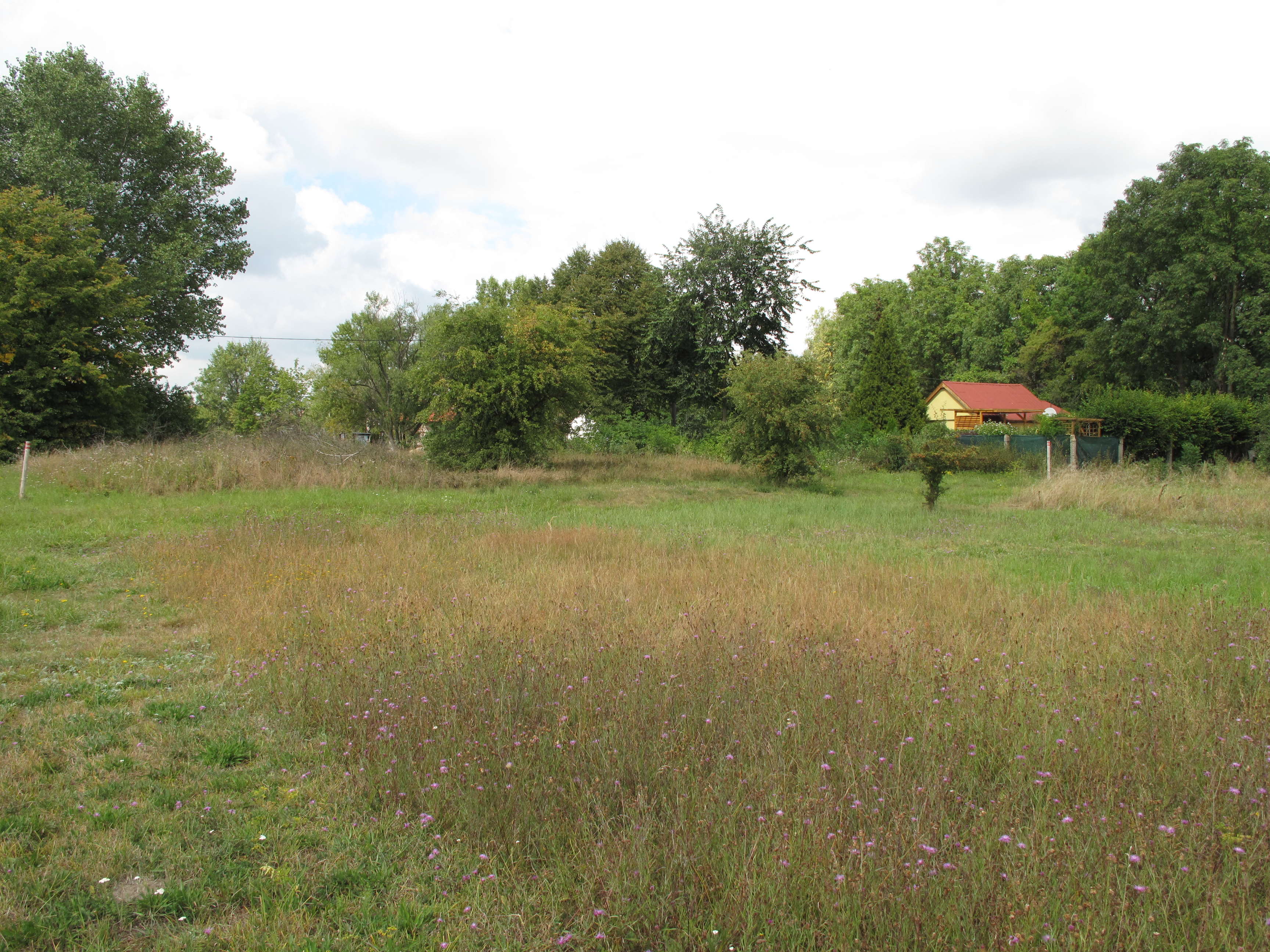 Přírodní památka Slaná louka u Újezdce. Okres Mělník, Česká republika.